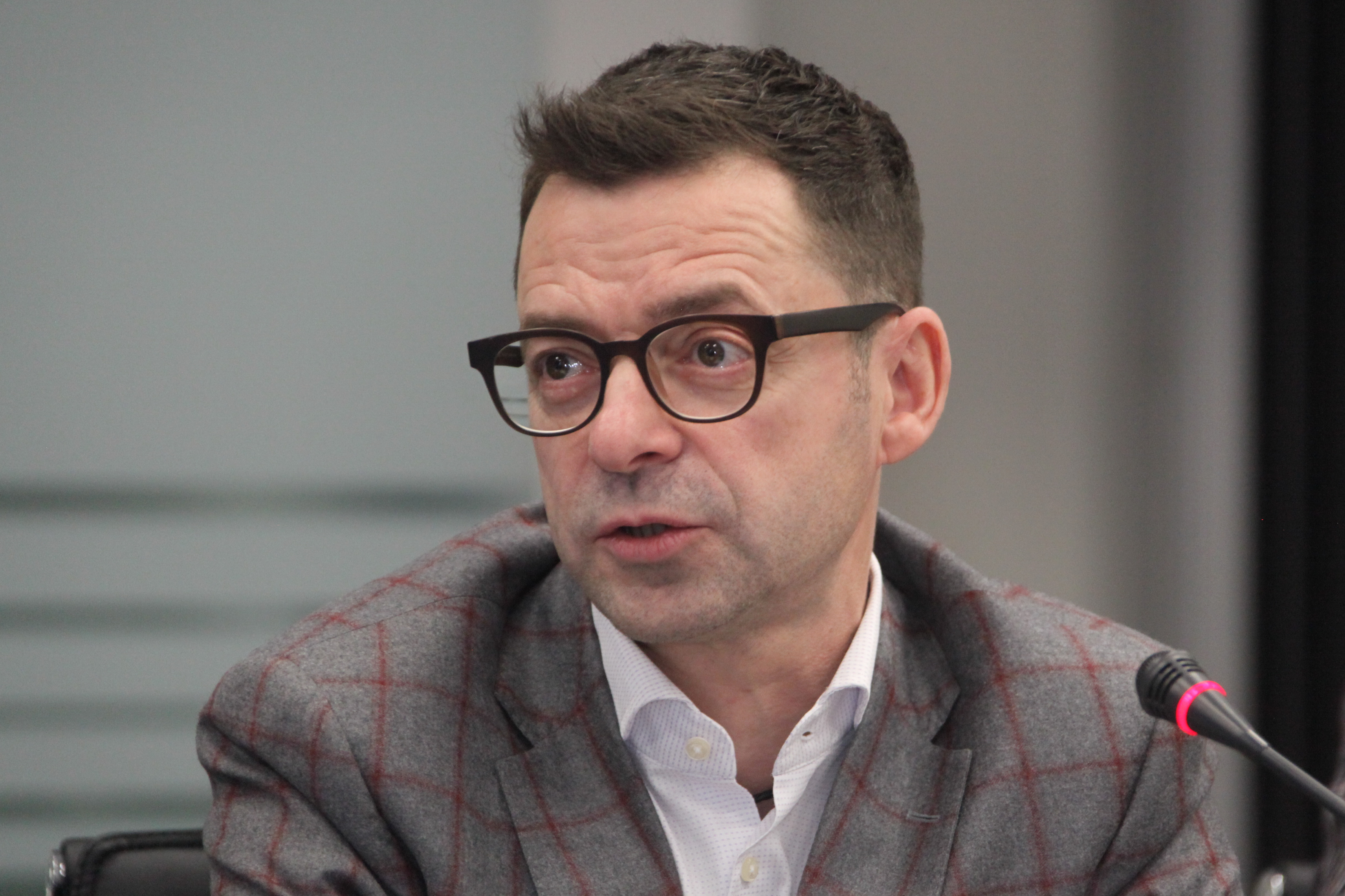 Евгений Гуревич, генеральный директор Капитал Лайф на пресс-конференция в офисе ВСС, февраль 2019 года